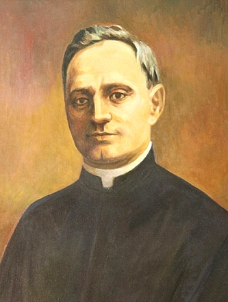 ks. kan. Zygmunt Męski